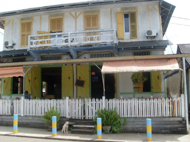 chez Modestine